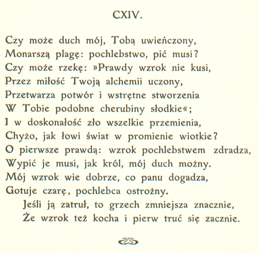 Sonety Shakespeare'a I-CXXXIV i CXXXVII-CLIV tłumaczenie Maria Sułkowska (MUS) sonet 114 strona 128